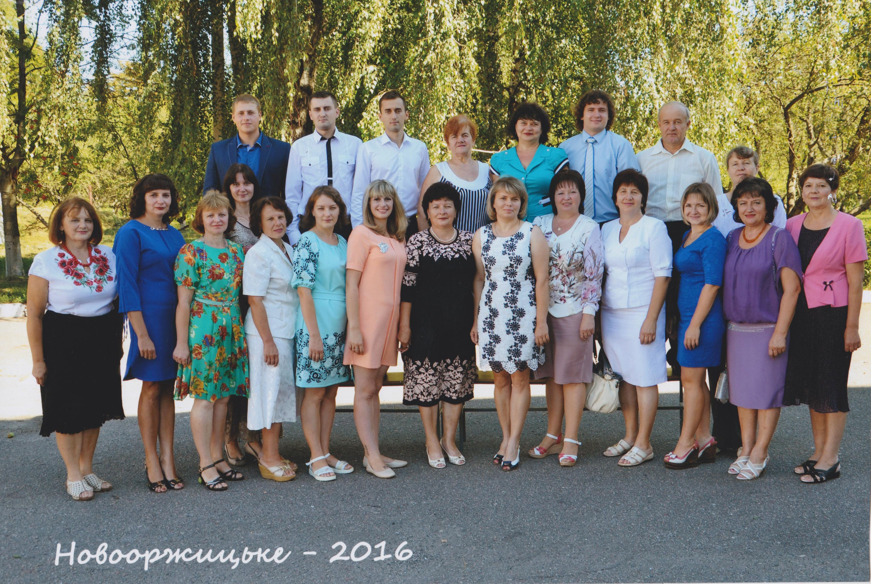 Учителі Новооржицької ЗОШ І-ІІІ ст